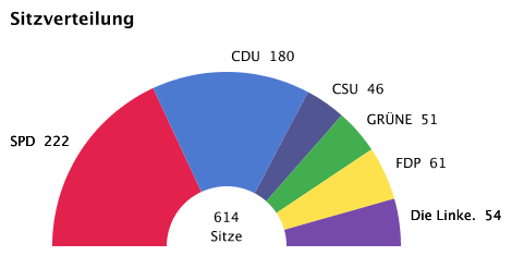 Bundestagswahlen 2005 PD: § 5 UrhG